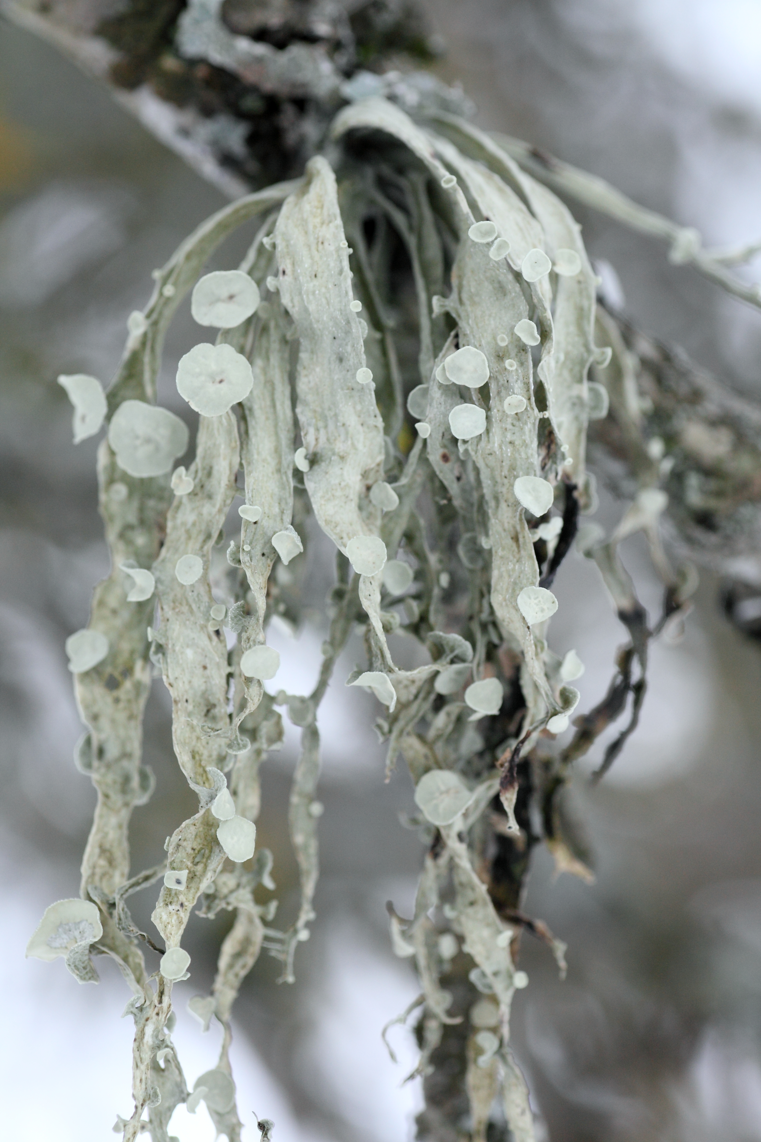 Saare-rihmsamblik vanal õunapuul Lehtmetsa külas Albu vallas 15. jaanuaril 2013